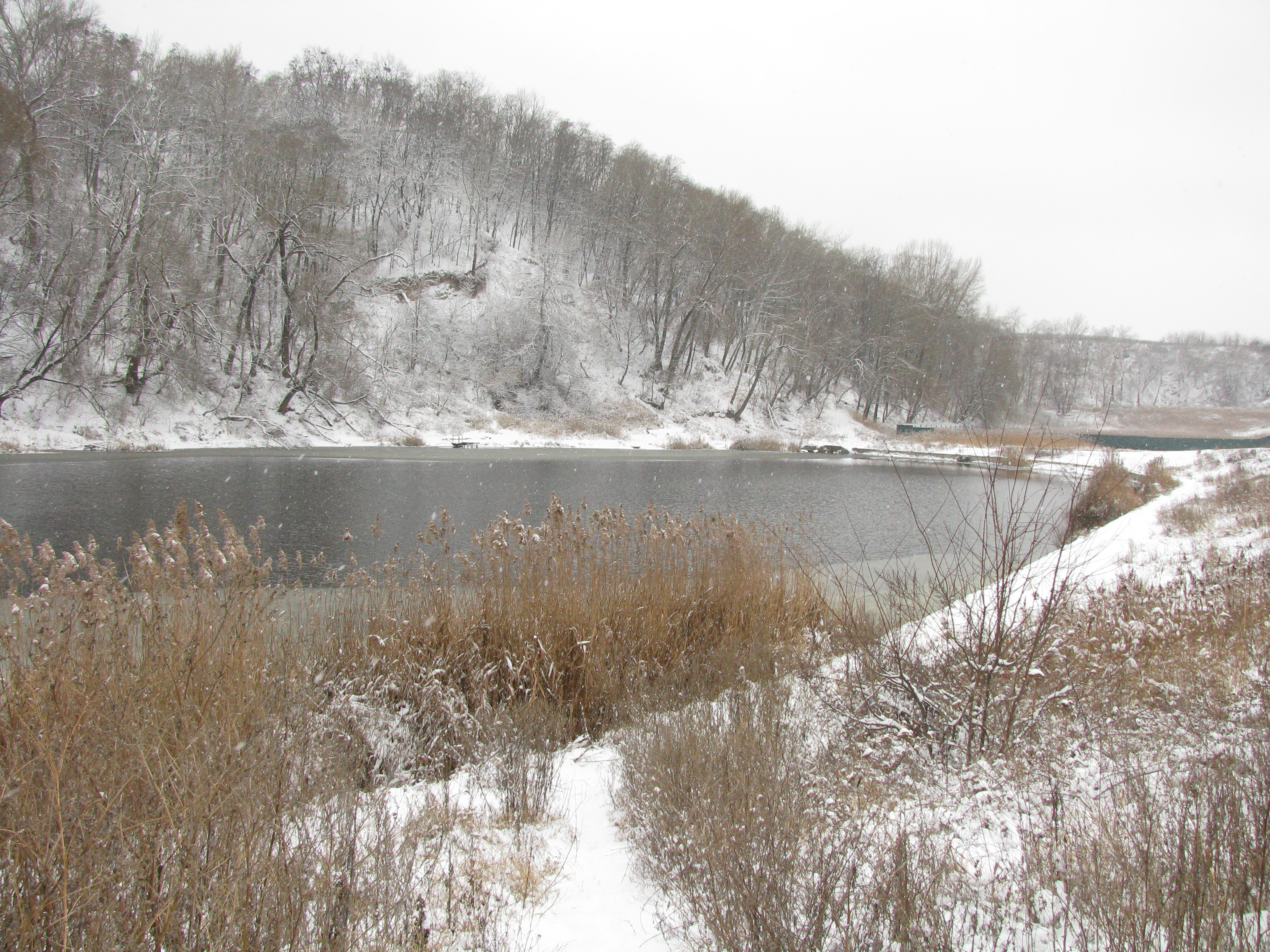 Зелене озеро, Подільський р-н